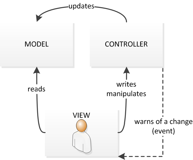 MVC Model View Controller